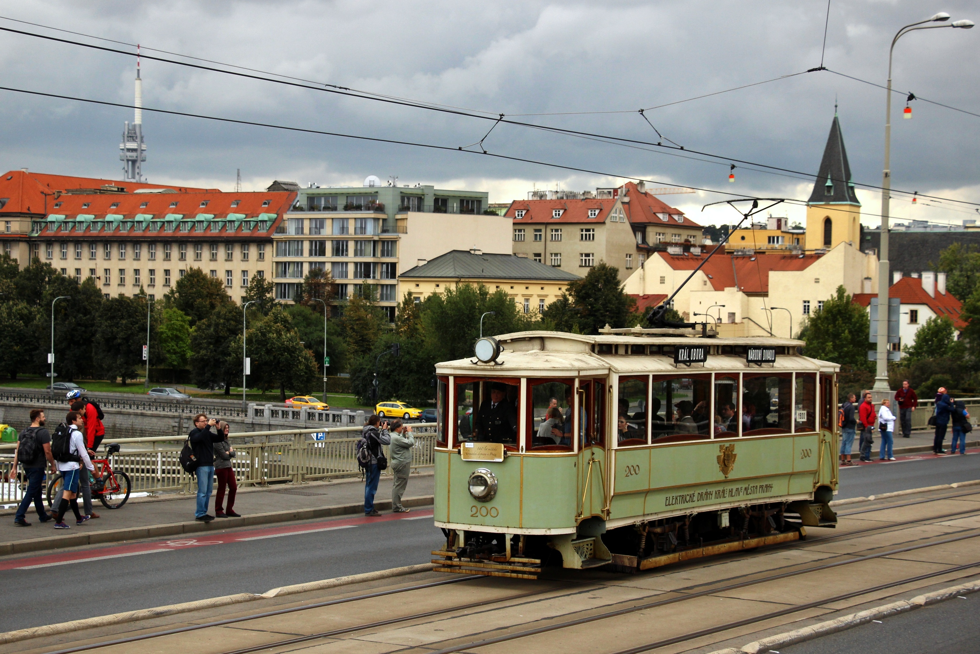 Vůz 200 při průvodu 140 let pražské MHD